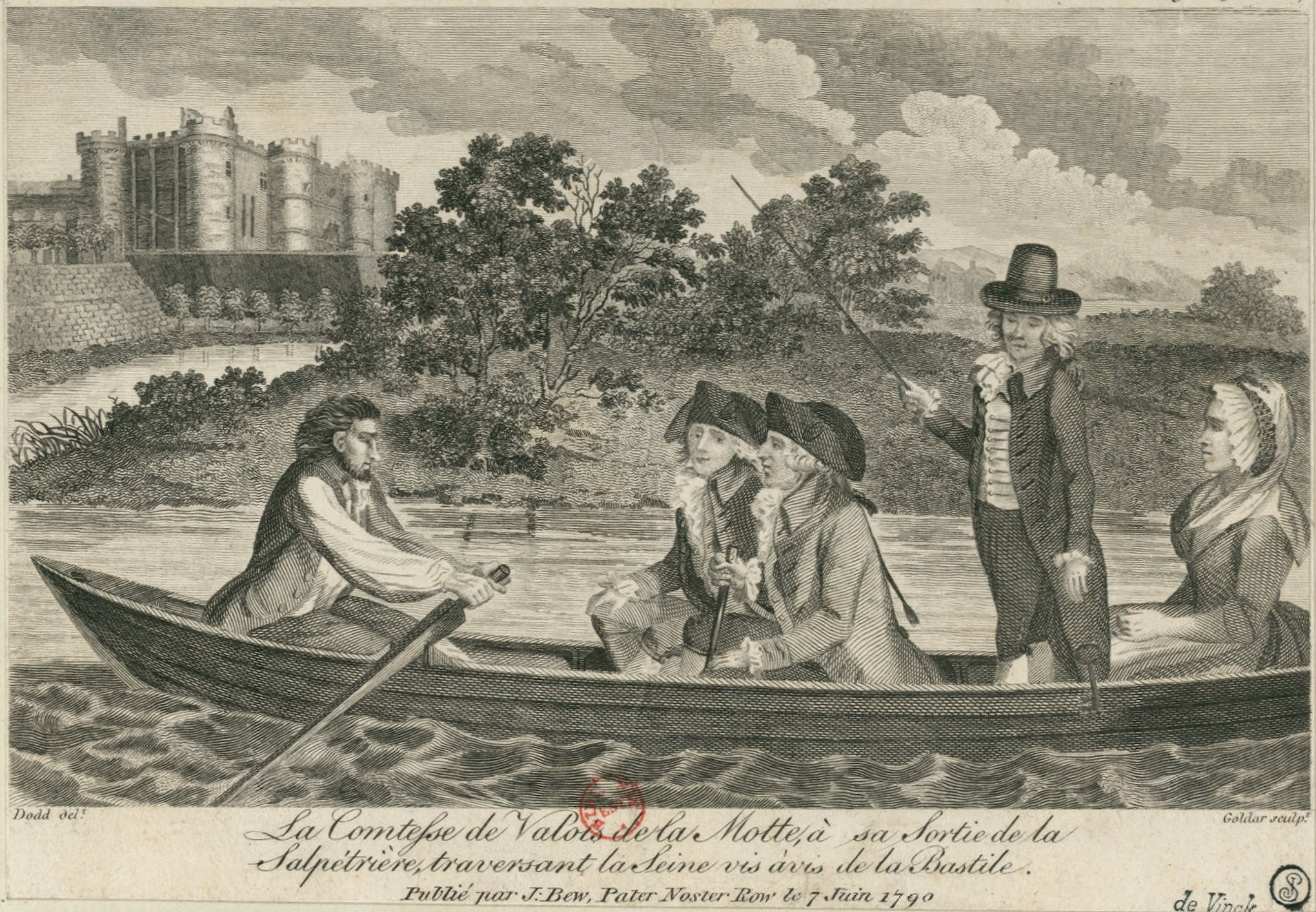 Stich mit der Abbildung Jeanne de Saint-Rémys bei ihrer Flucht aus der Pariser Salpêtrière